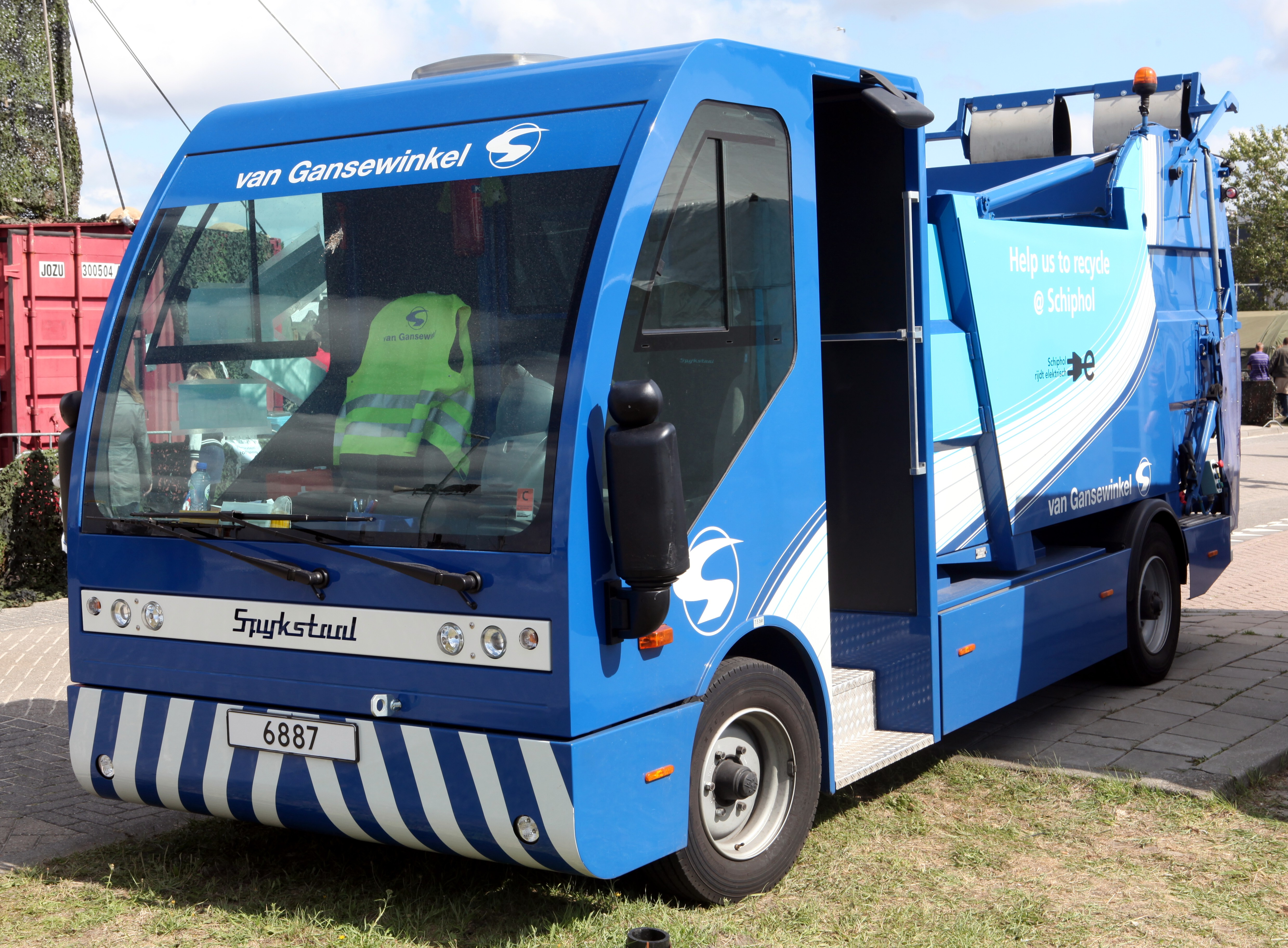 Spijkstaal van Gansewinkel